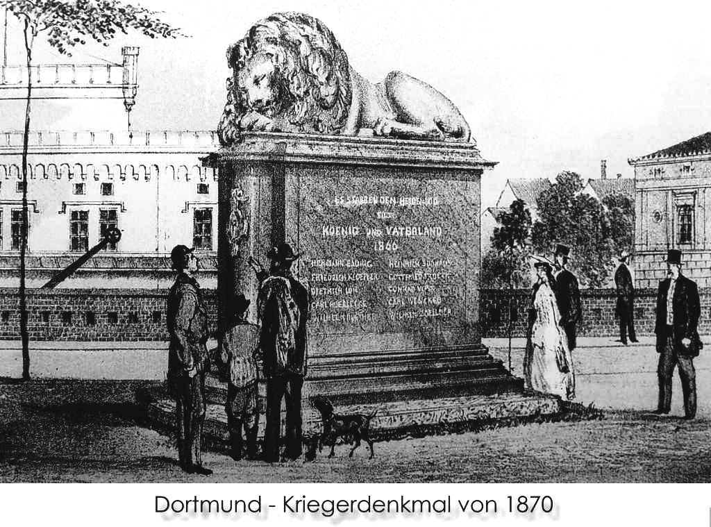 Kriegerdenkmal im Dortmunder Westpark, Historische Ansicht von 1870, damaliger Standort: Hauptbahnhof Dortmund